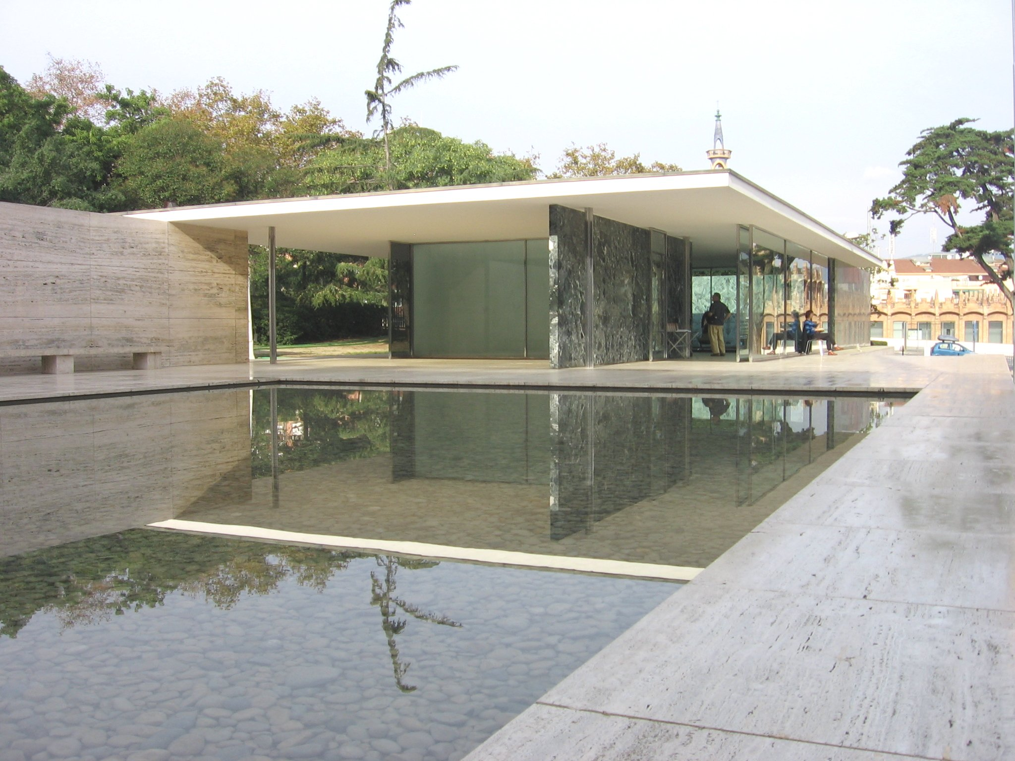 Pabellón Mies van der Rohe, Montjuïc (Barcelona)